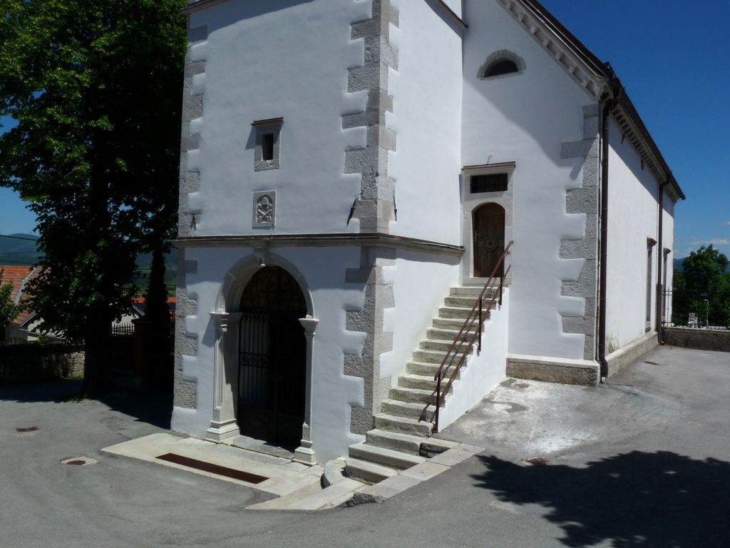 Cerkev sv. Petra, Pivka